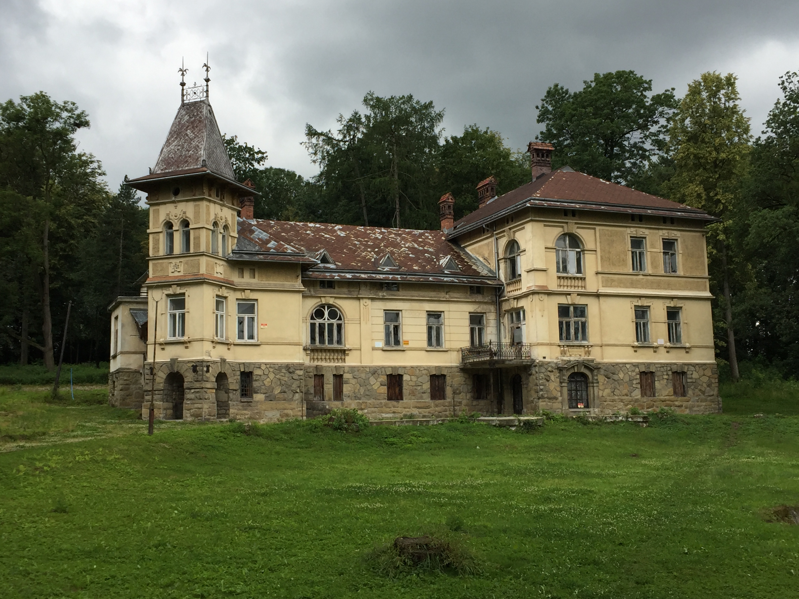 Pałac Głowińskich w Rabie Wyżnej